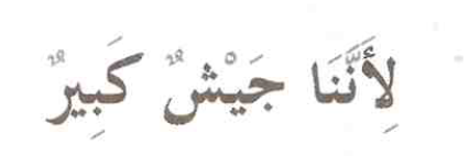 Харакатты мәтін